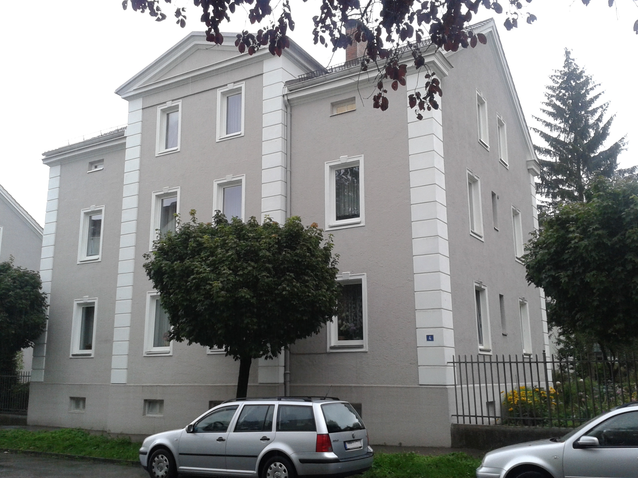 Haindl’schen Stiftungshäuser in der Bleichstraße (Augsburg)